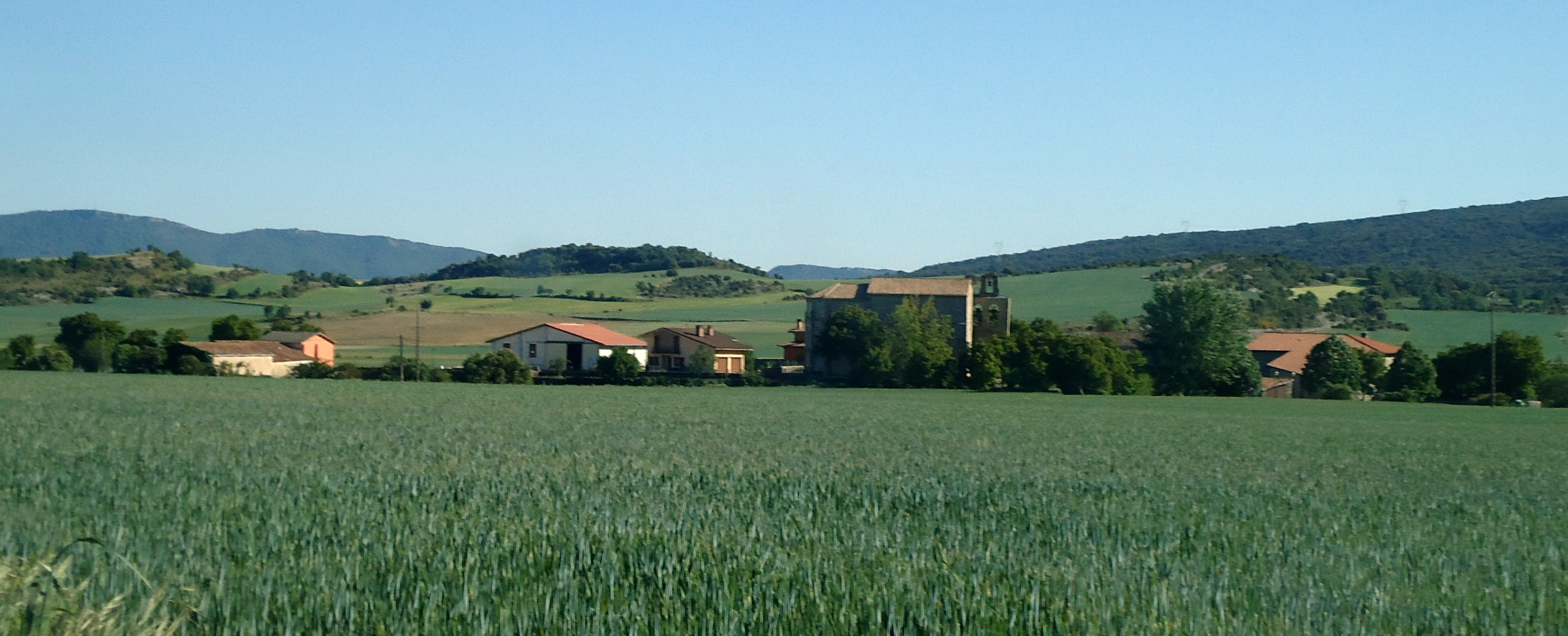 Otobarren herria (Gasteiz)